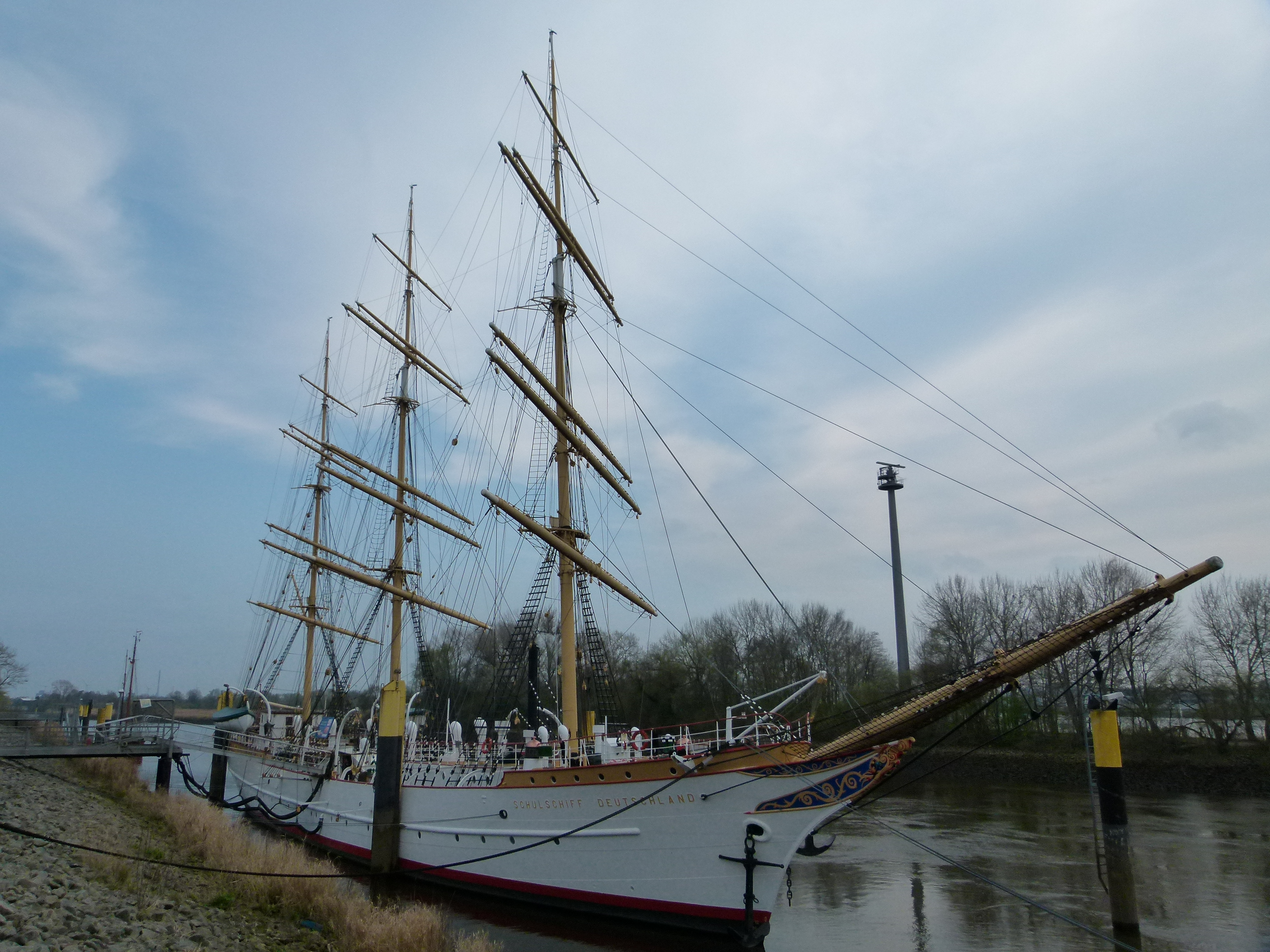 Schulschiff Deutschland in Bremen (Vegesack)